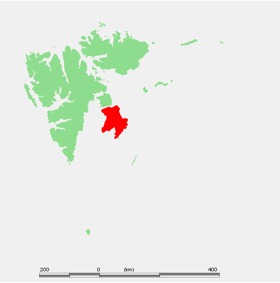 Svalbard Islands - Russia - Spitsbergen - Edge Island.PNG